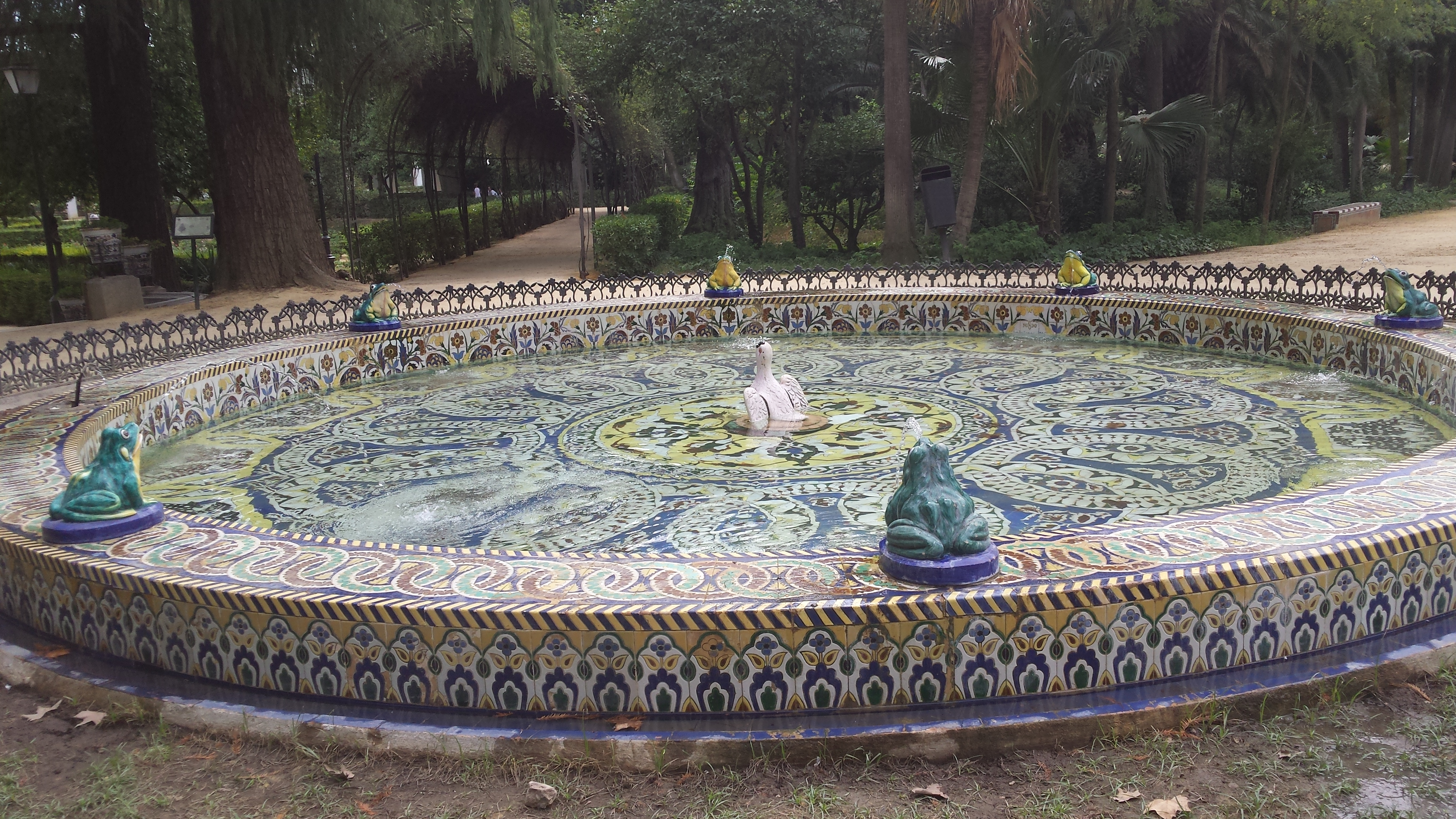 Fuente de las Ranas del Parque de Maria Luisa en Sevilla